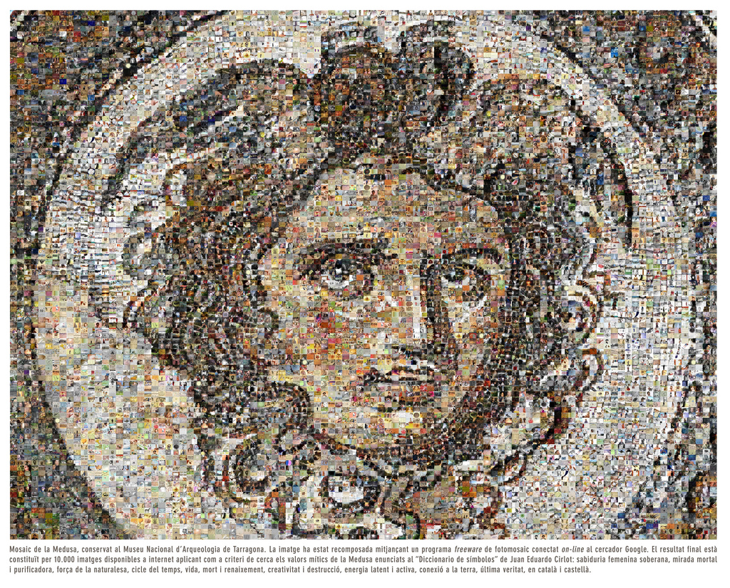 "Medusa" és un mosaic, conservat al Museu Nacional d'Arqueologia de Tarragona. La imatge ha estat recomposada mitjançant un programa freeware de fotomosaic connectat online al cercador Google. El resultat final està constituït per 10.000 imatges disponibles a Internet aplicant com a criteri de cerca els valors mítics de la Medusa anunciats al "Diccionario de símbolos" de Juan Eduardo Cirlot: saviesa femenina sobirana, mirada mortal i purificadora, força de la naturalesa, cicle del temps, vida, mort i renaixement; creativitat i destrucció, energia latent i activa, connexió a la terra, última veritat, en català i castellà. L'autor de l'obra és Joan Fontcuberta. Fins al 17 de maig es pot veure al CCCB dins l'exposició "Il·luminacions. Catalunya visionària"